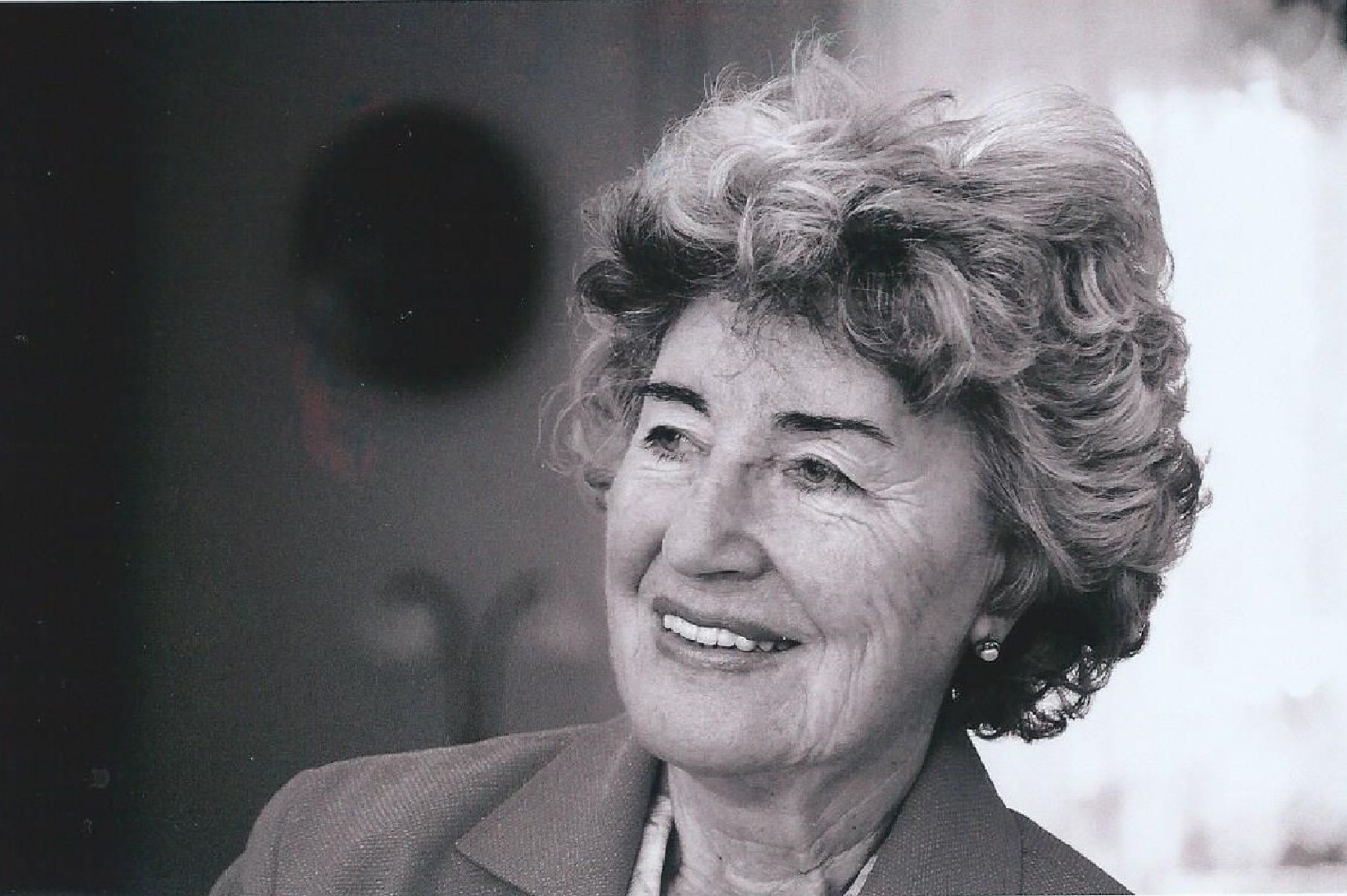 Christa Luft, Privataufnahme im Jahr 2010